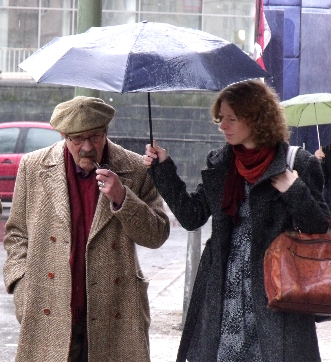 Günter Grass vor dem Berliner Ensemble, wo er an einer Lesung teilnahm.